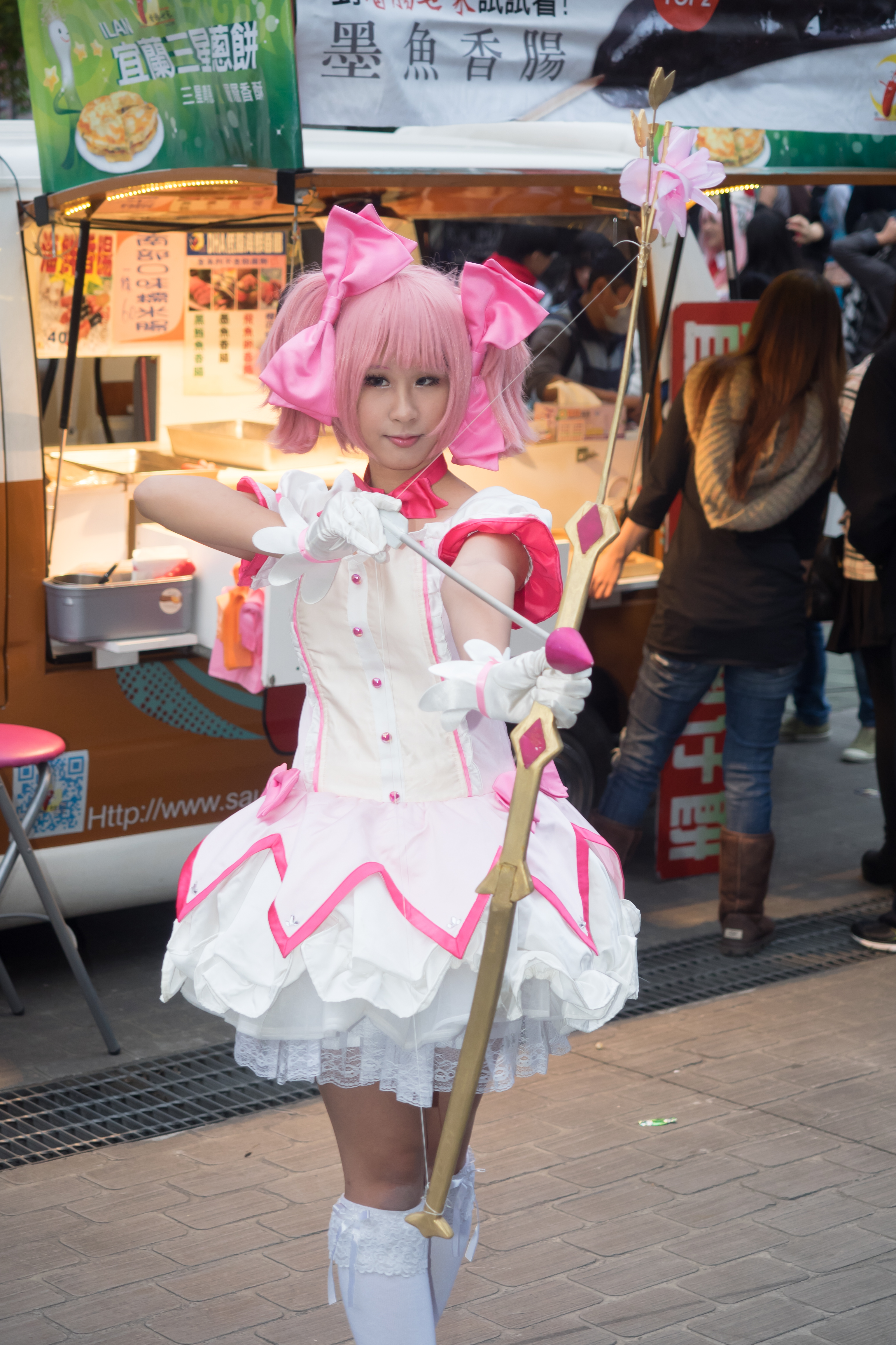 第38屆台灣同人誌販售會，《魔法少女小圓》鹿目圓cosplayer。